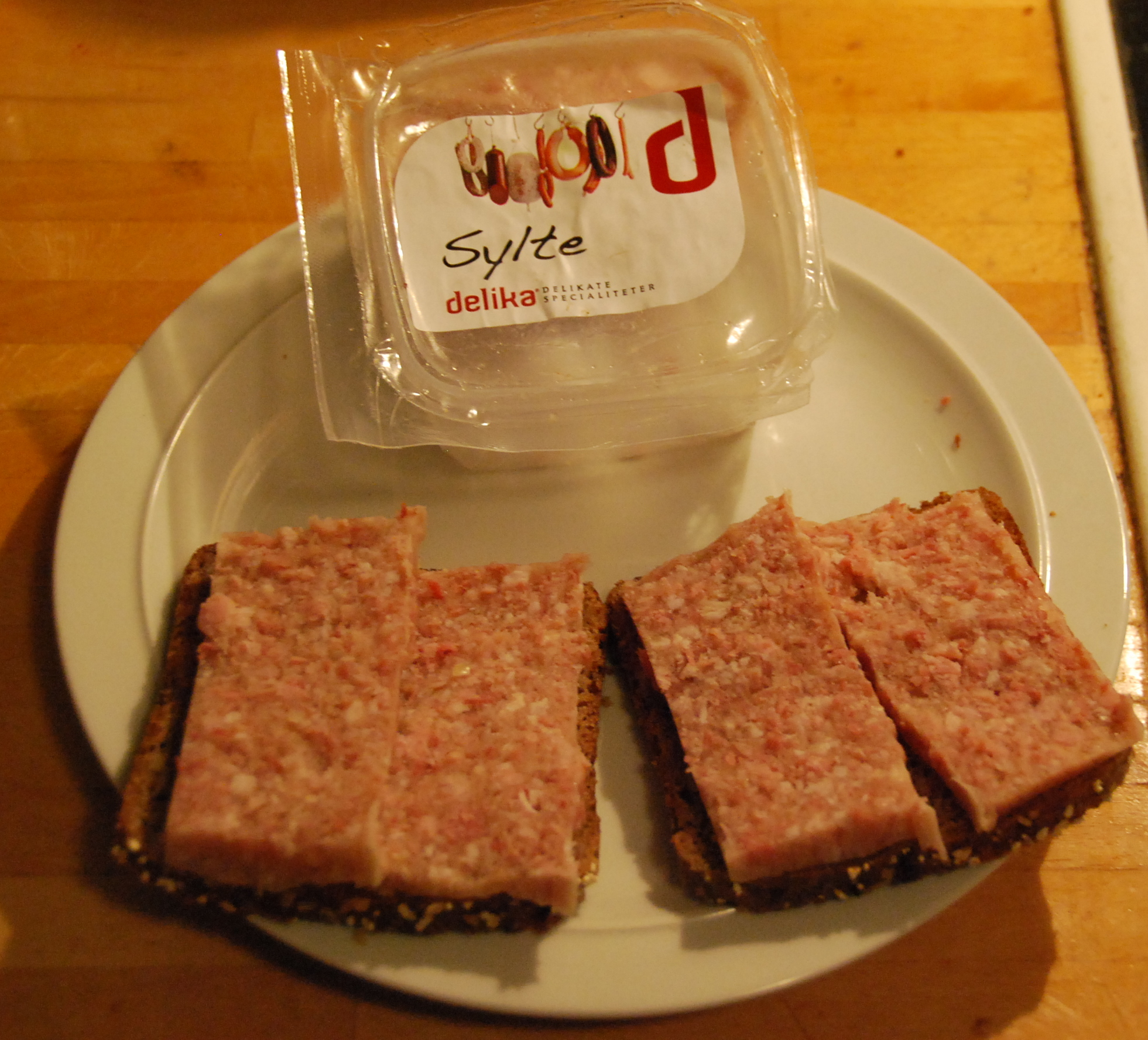 2 stk. rugbrød med Sylte og en pakke med sylte fra Delika.